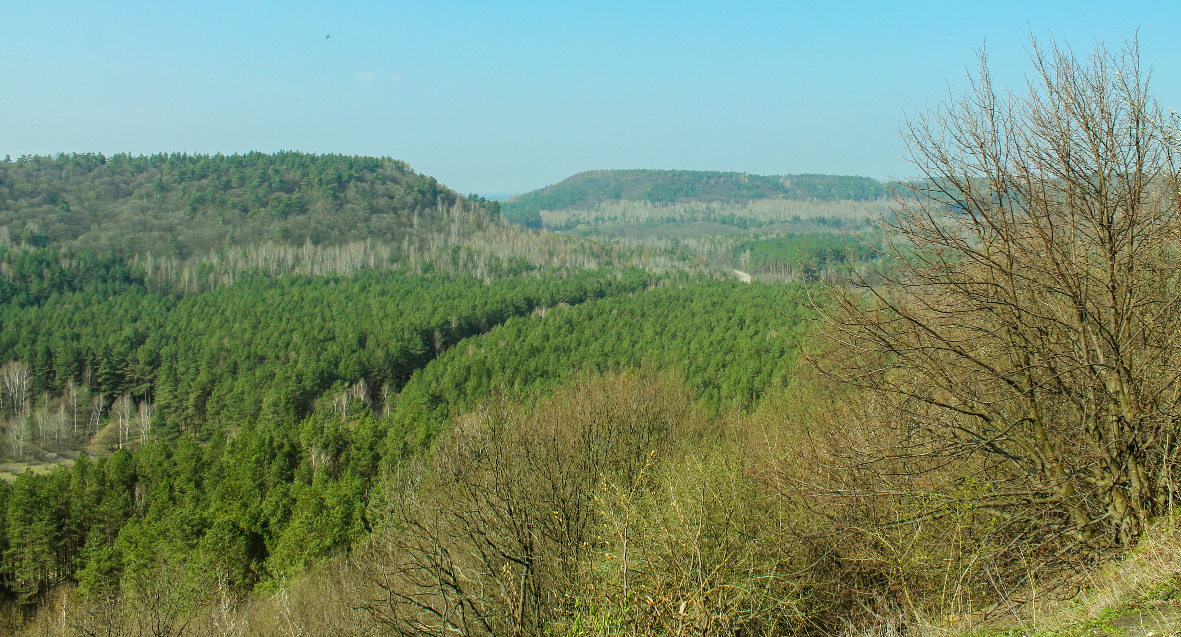 «Кременецькі гори», Кременецький та Шумський райони, кв.кв. 40, 41, 43, 44, 46, 47, 71 Кременецького л-во, кв. 19-22, 24-53, 55-68 Білокриницьке л-во, кв.кв. 55-88, кв. 90 вид. 1-8, 9.1, 10-18, 20-25, 27-31, кв. 91 вид. 11, 3-9, 10.1, 11-20, кв.кв. 92-93, 95 Волинське л-во ДП «Кременецьке лісове господарство»